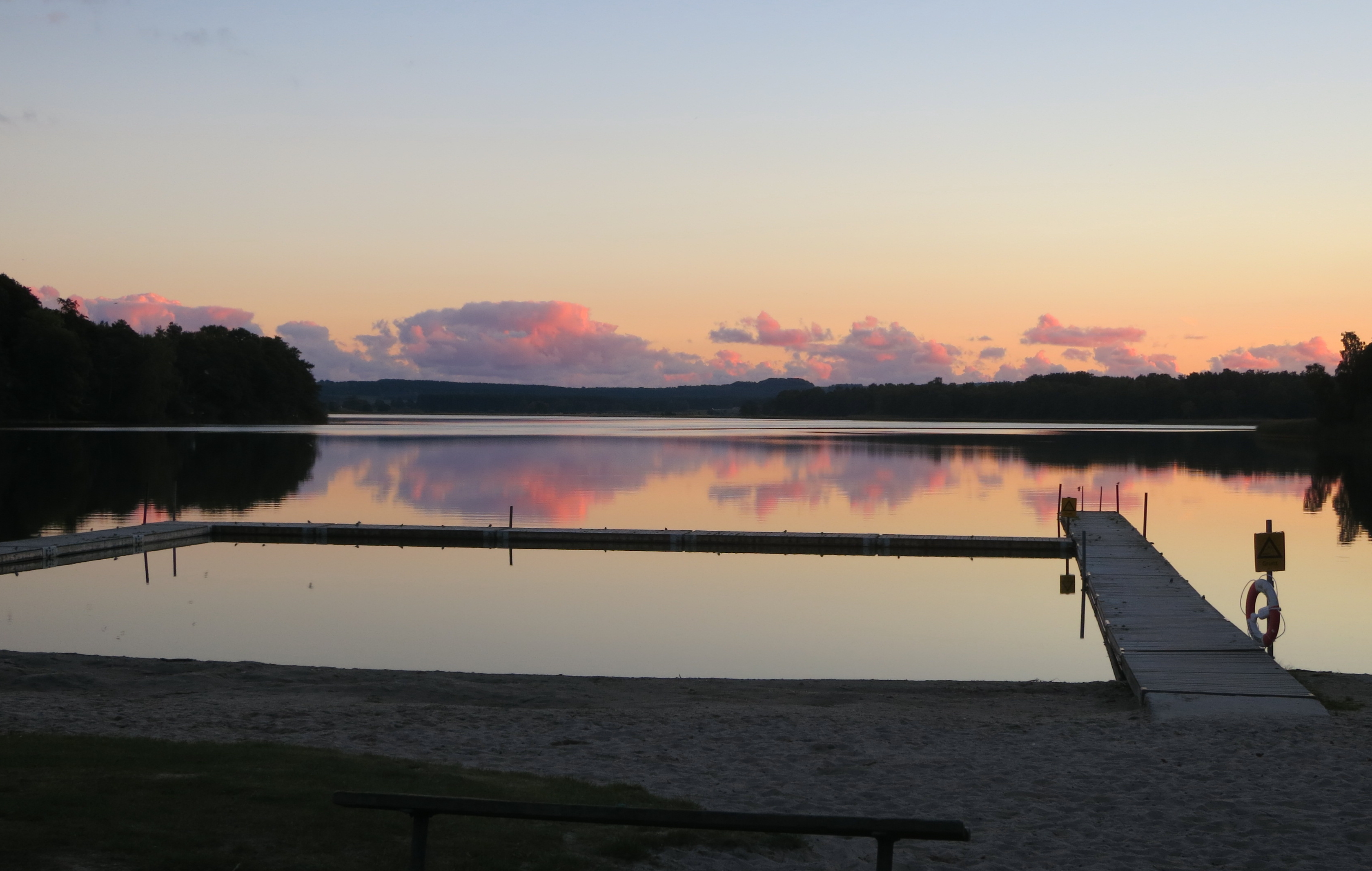 Sövdesjön